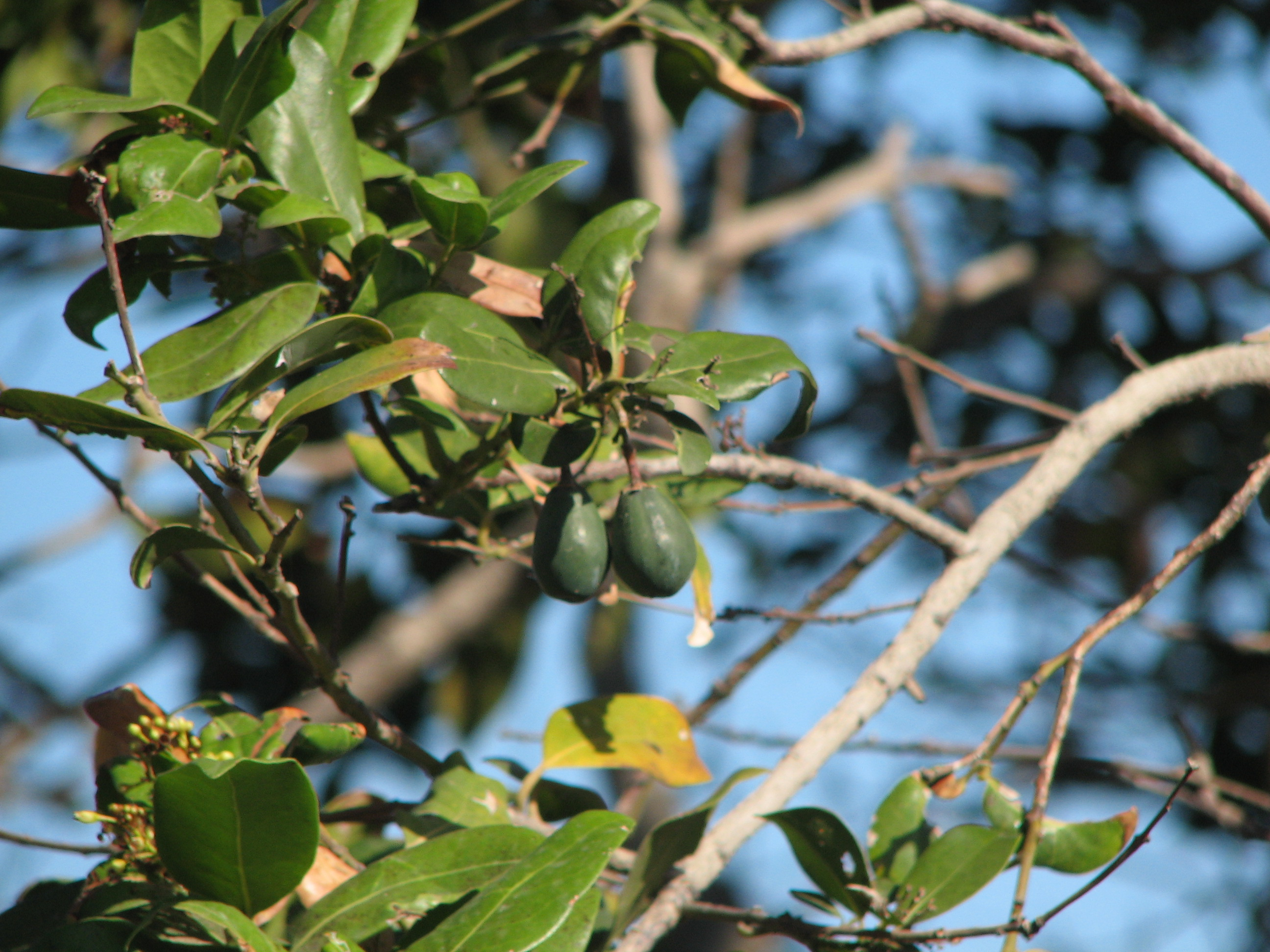 Barbuzano (Apollonias barbujana). Detalle de frutos. Finca Boquín, Icod de los Vinos, Tenerife.